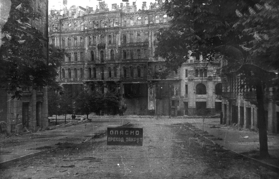 Київський Париж: підірвана будівля